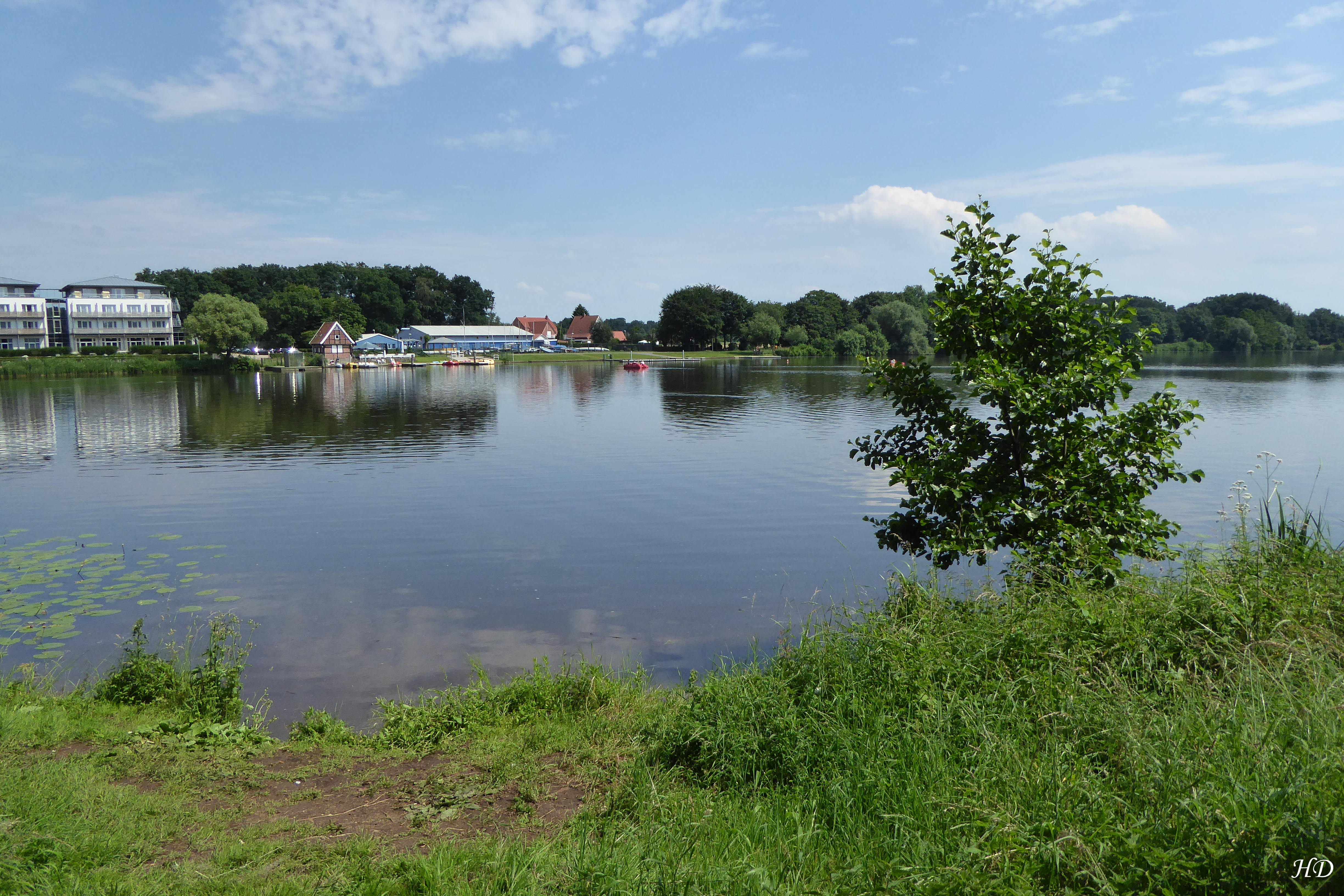 Vechtesee